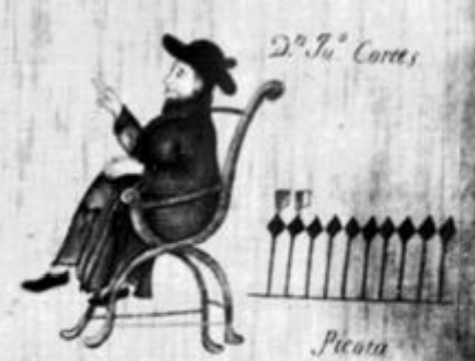 Cosiiopii II en el Lienzo de Guevea, nótece la rotulación de su nombre español en la parte superior derecha